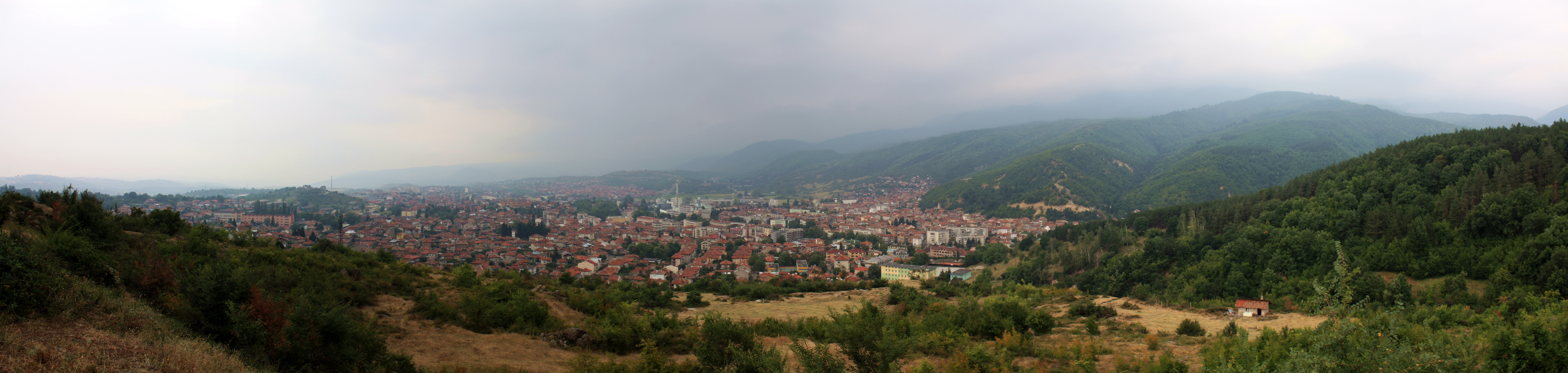 Blick auf die Stadt Peschtera in Bulgarien, aufgenommen im August 2015 vom Osthang des Berges "Turska Glava" (Турска глава) auf rund 550 m über NN. Der Berg befindet sich westlich der Stadt. IMG 9206-12